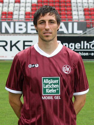 Mathias Abel, Fußballspieler